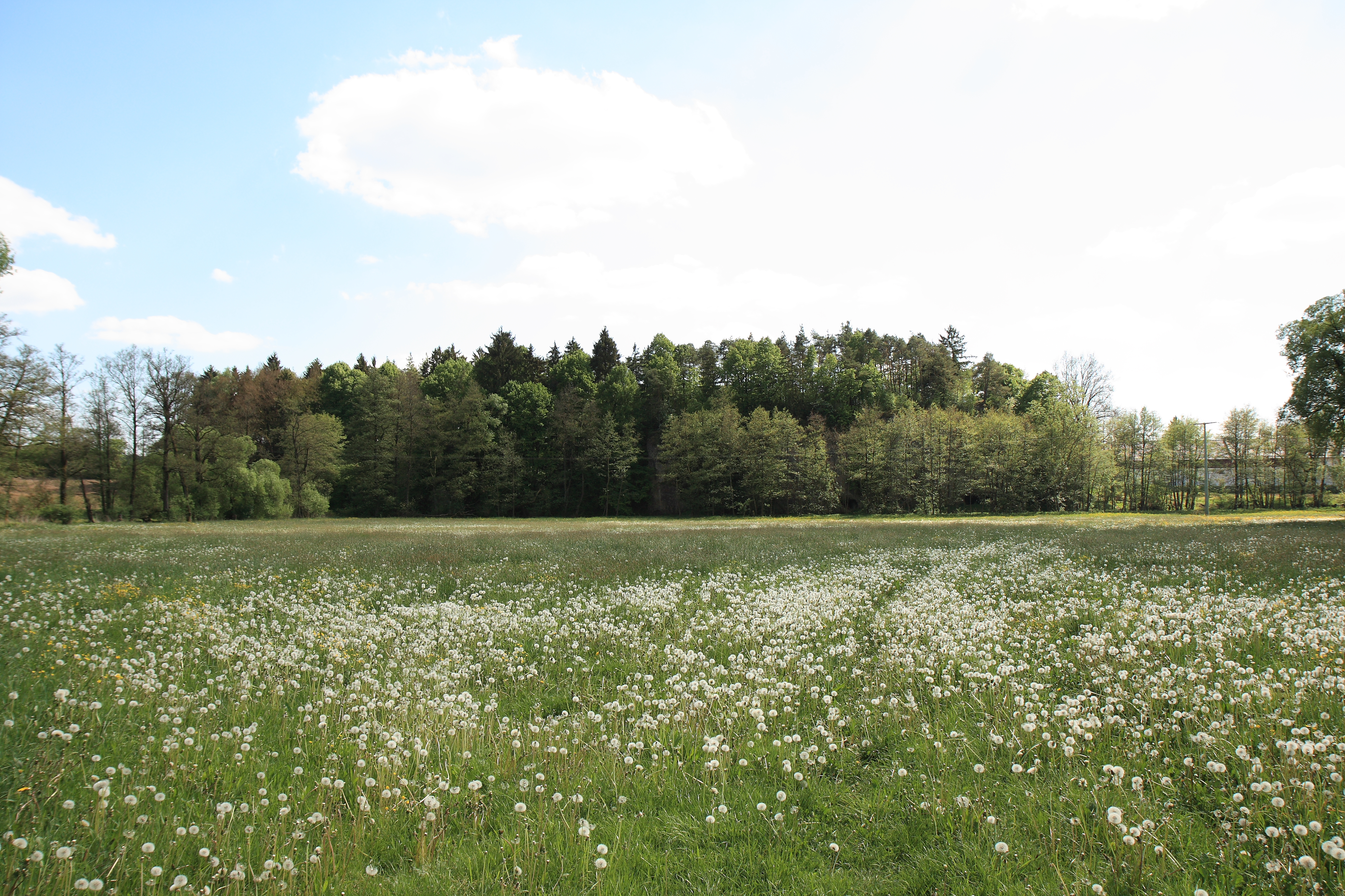 Burgstall Gernotenstein - Ansicht des Felsriffs